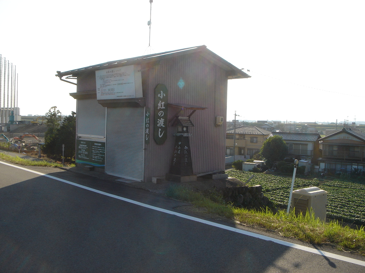 Kobeni no Watashi（小紅の渡し,長良川堤防上にある渡船小屋,岐阜市）,Gifu,Gifu,Japan(岐阜県岐阜市)で撮影